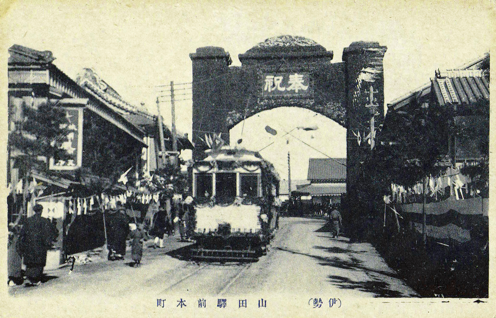 大正の御大典で飾り付けられた神都線車輌と奉祝門